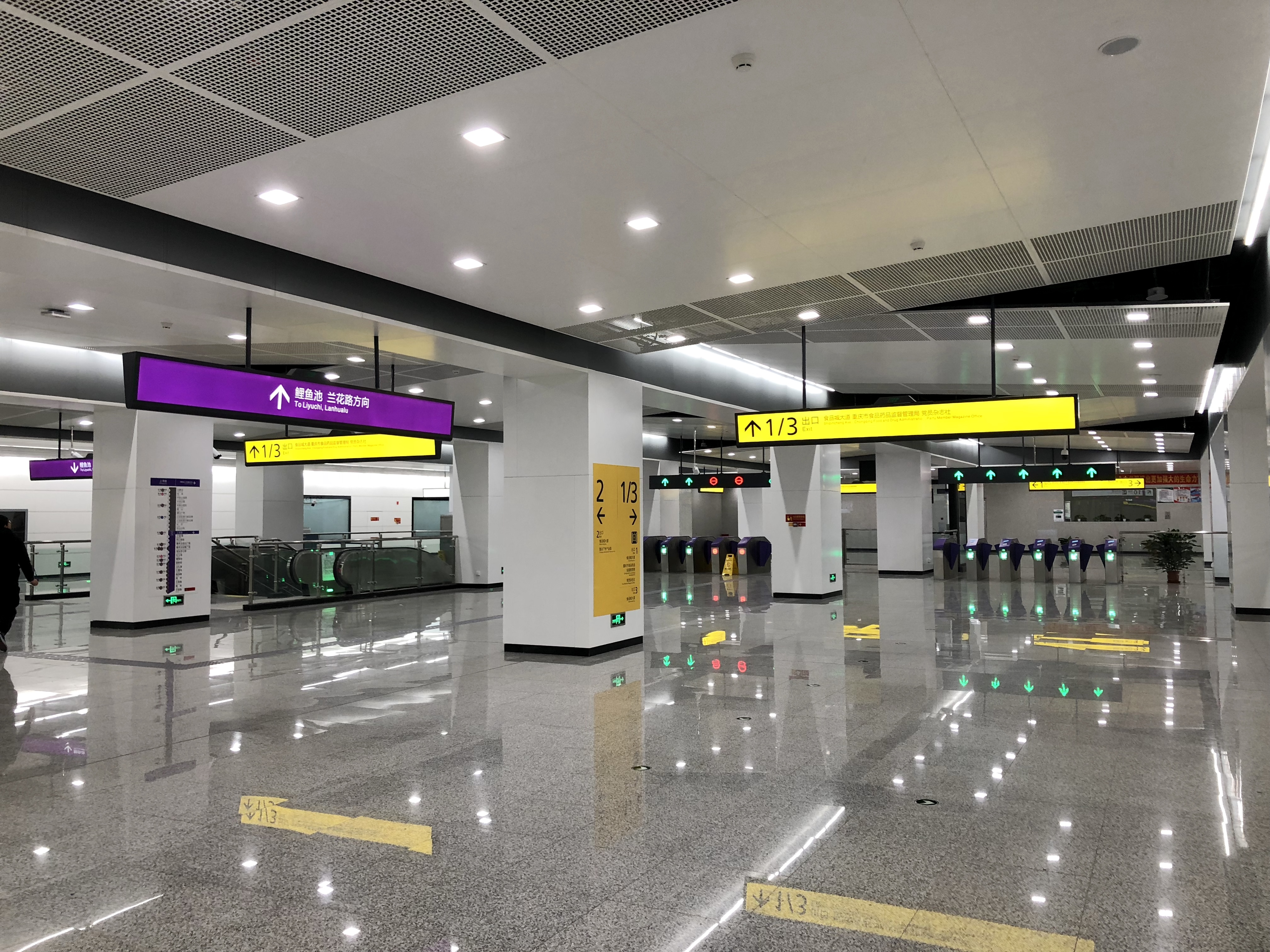 中文（中国大陆）: 10 号线上湾路站